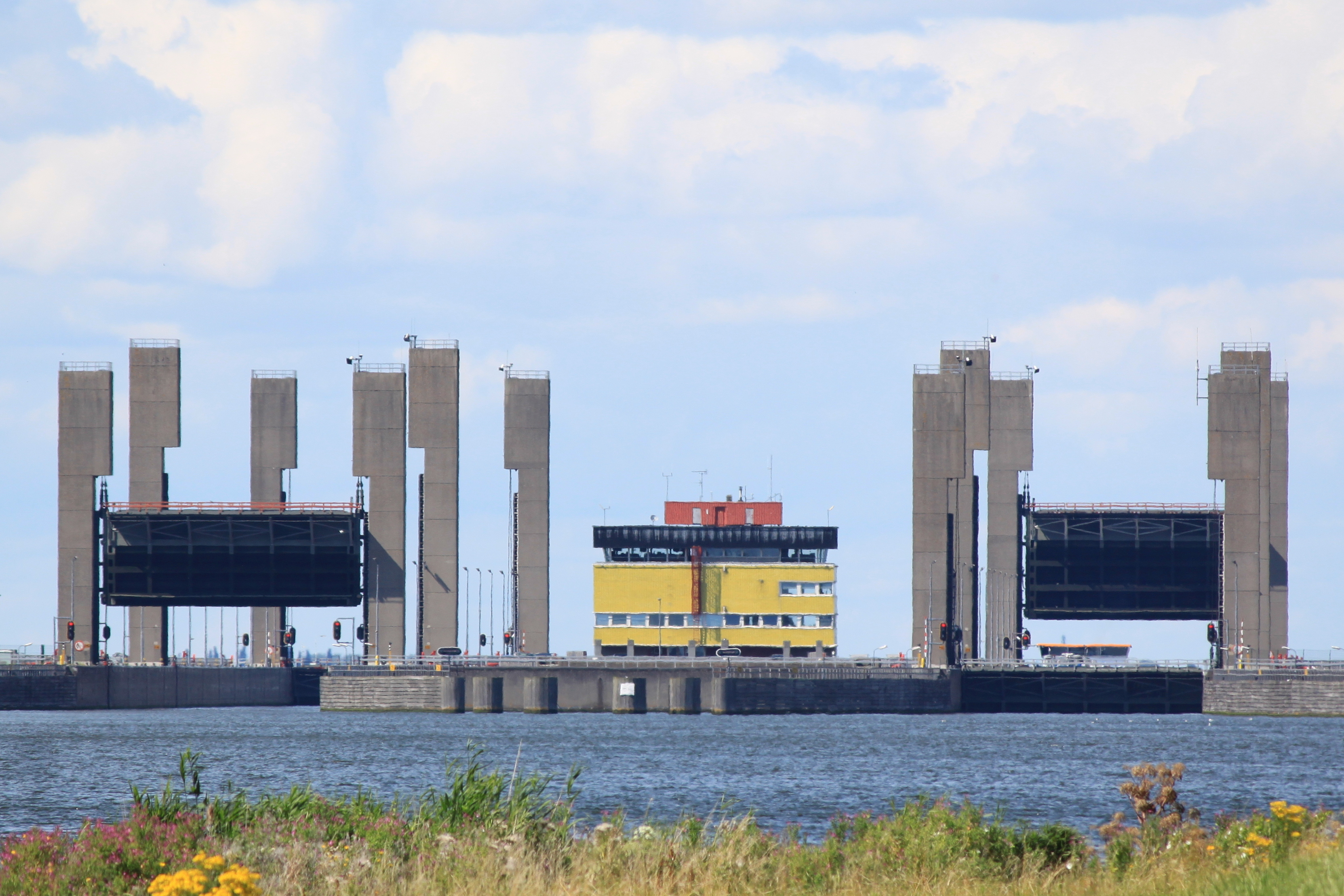 Kreekraksluizen, 21 juli 2012